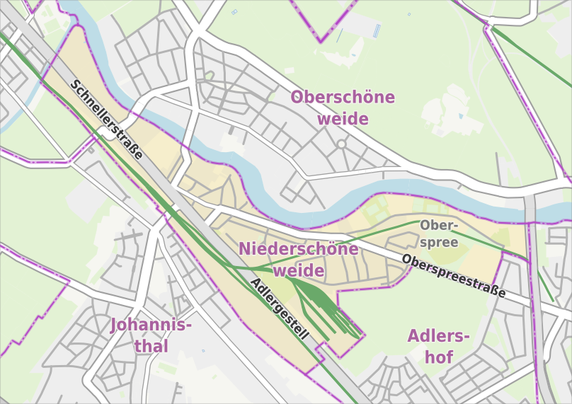 Übersichtskarte der Straßen und Ortslagen in Berlin-Niederschöneweide